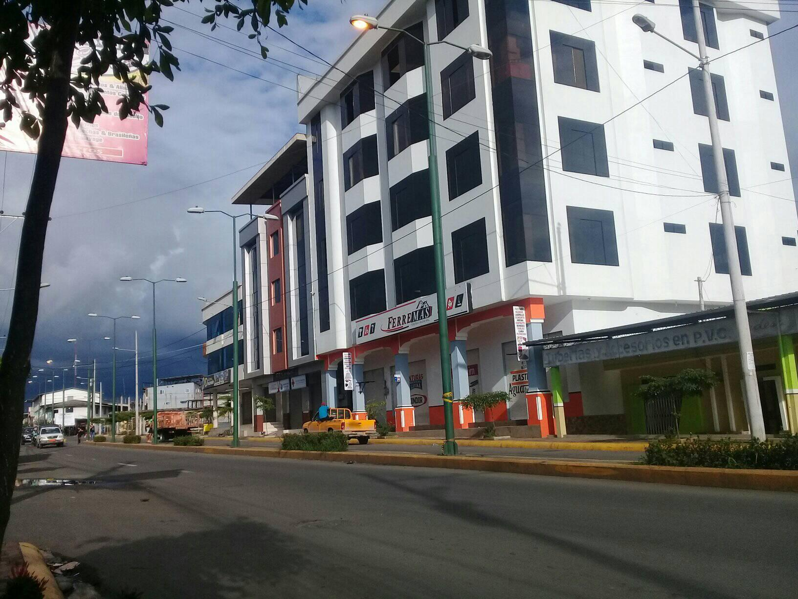 Edificios en Quinsaloma.